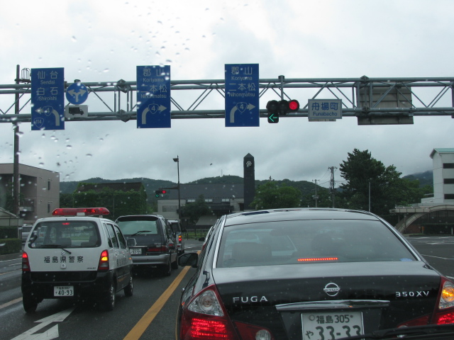 2009年8月11日、国道13号山形方面より撮影